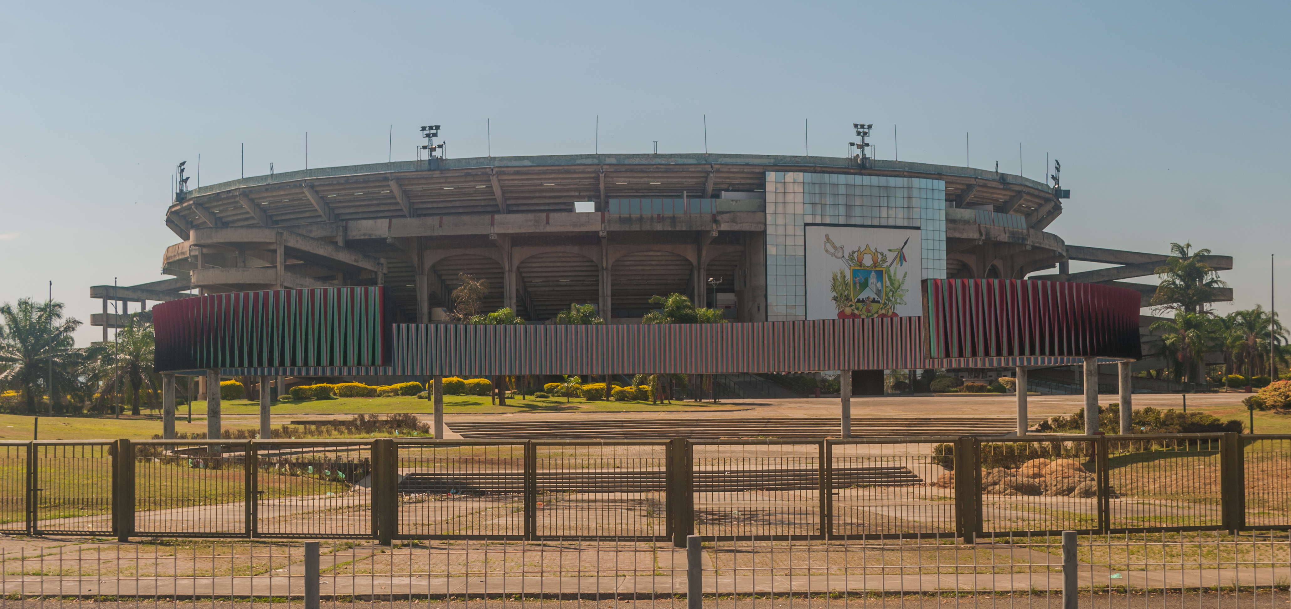 Plaza de Toros Monumental de Valencia, Venezuela